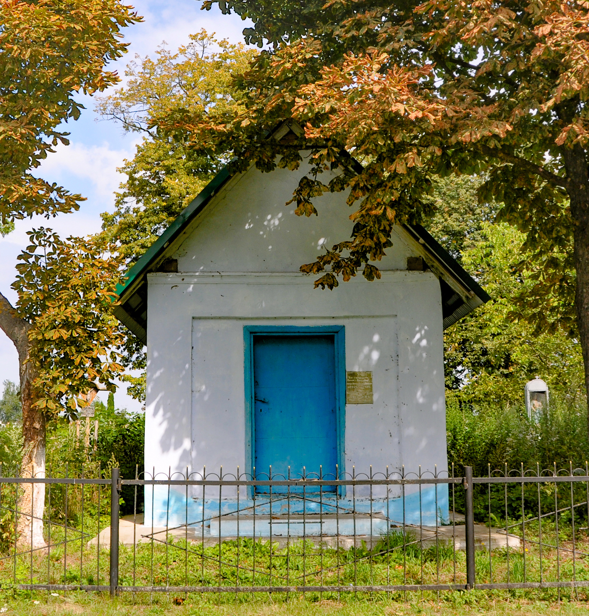 Богослужебна каплиця (1890 р.) в селі Шманьківці Чортківського району Тернопільської області України.